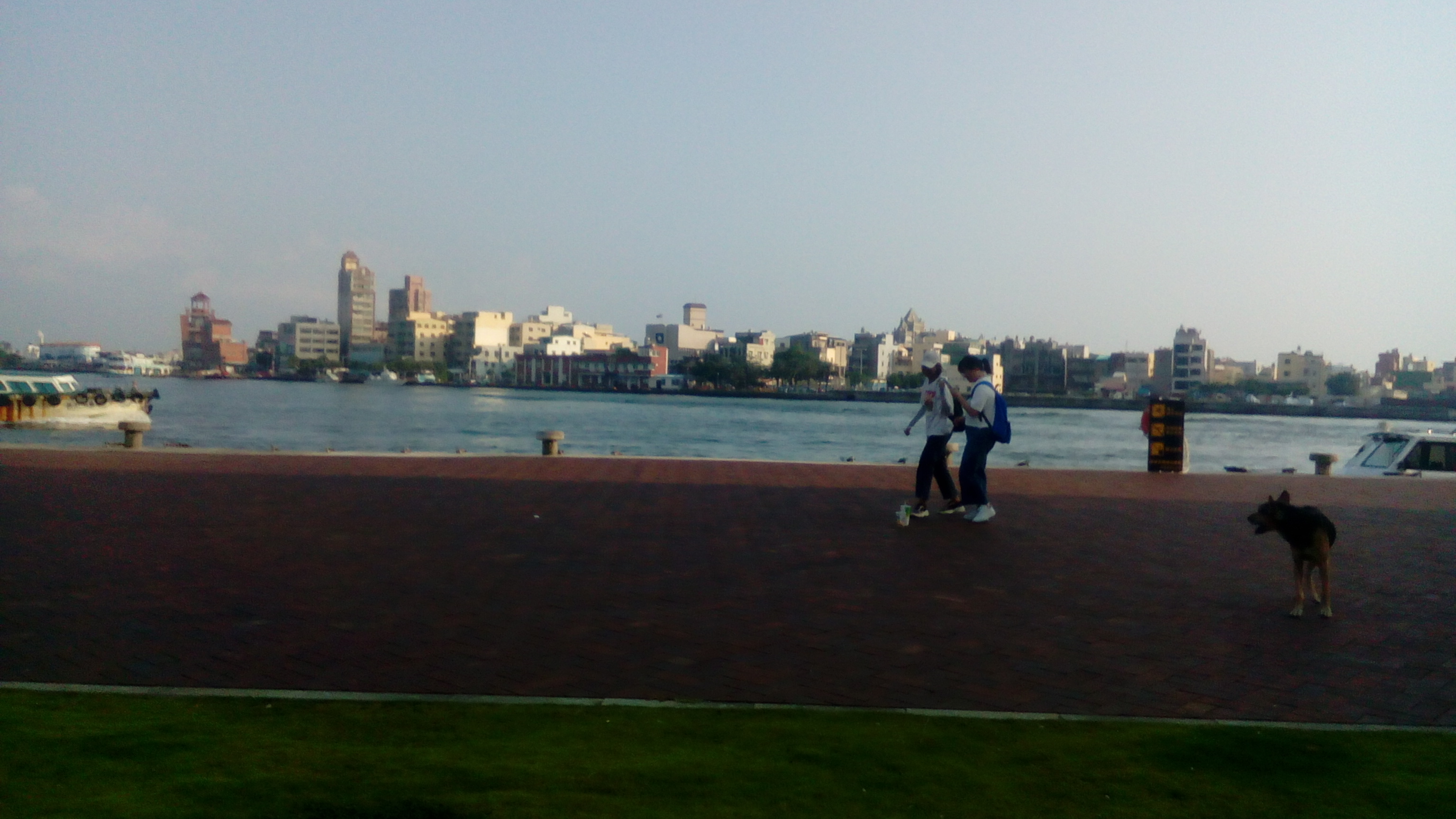 從鼓山看旗津 中間海域為高雄港